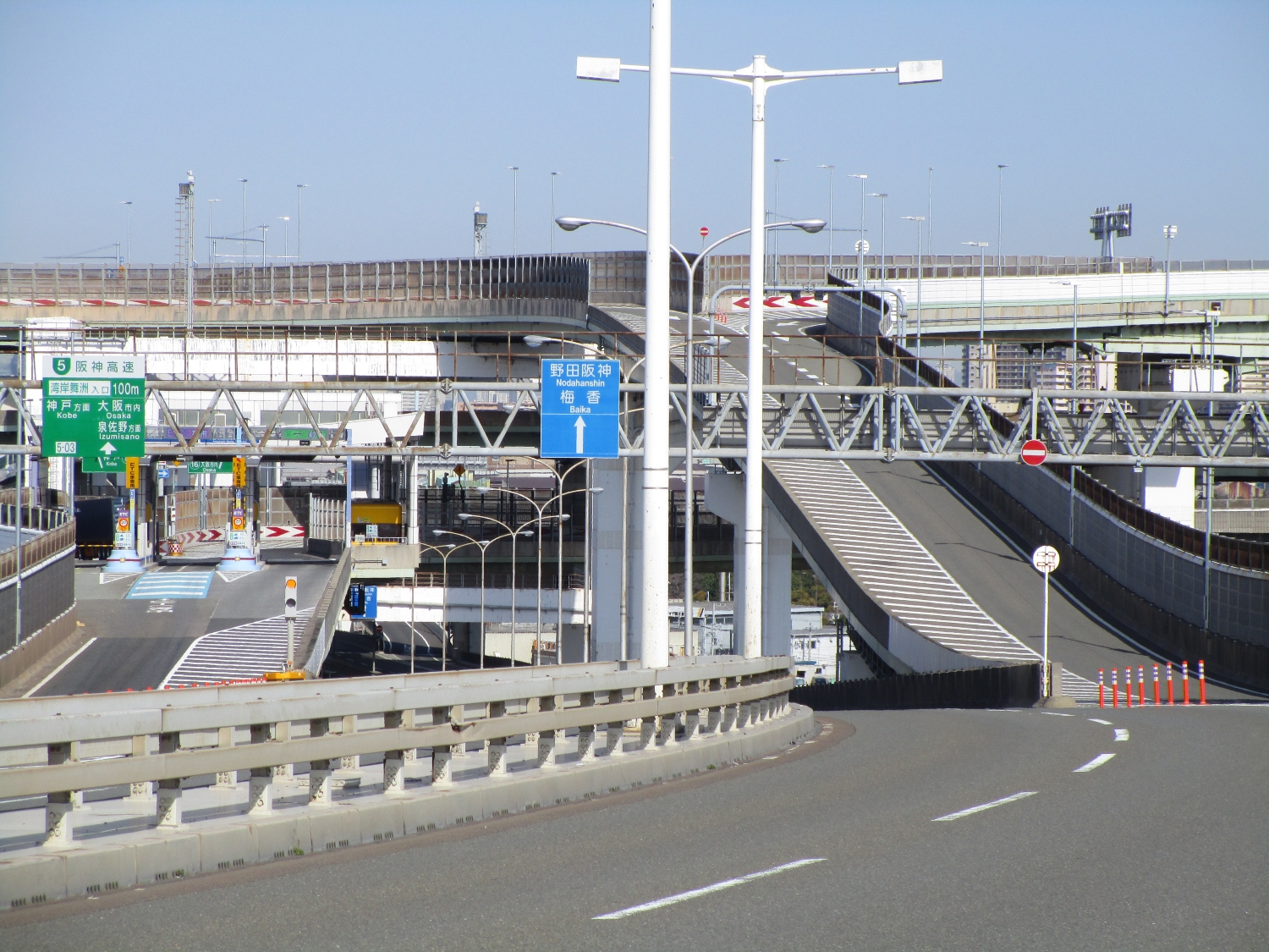 阪神高速5号湾岸線・湾岸舞洲出入口（此花大橋より撮影）